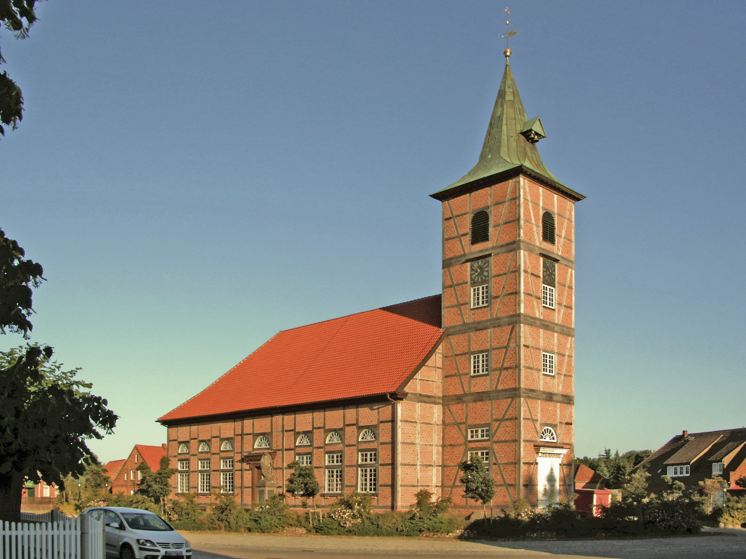 Evangelische Kirche in Neuhaus an der Elbe